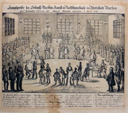 Hauptprobe der Schnell-Barbier-Kunst im Rathhaussaale der Amtsstadt Buchen / am 1. December 1858, in der Abend-Stunde zwischen 7 bis 8 Uhr